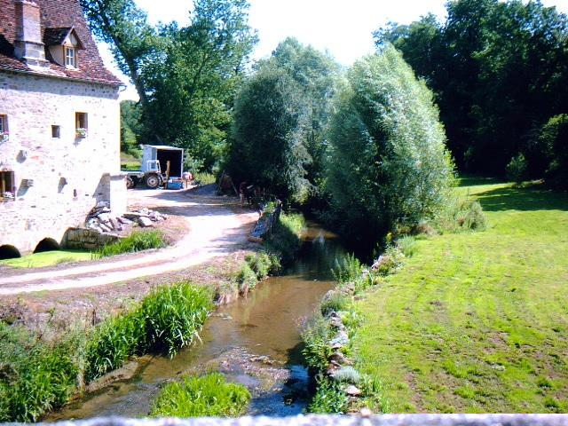 Francès petite rivière passant au Bourg (46120) situé dans la région Midi-Pyrénées, France.